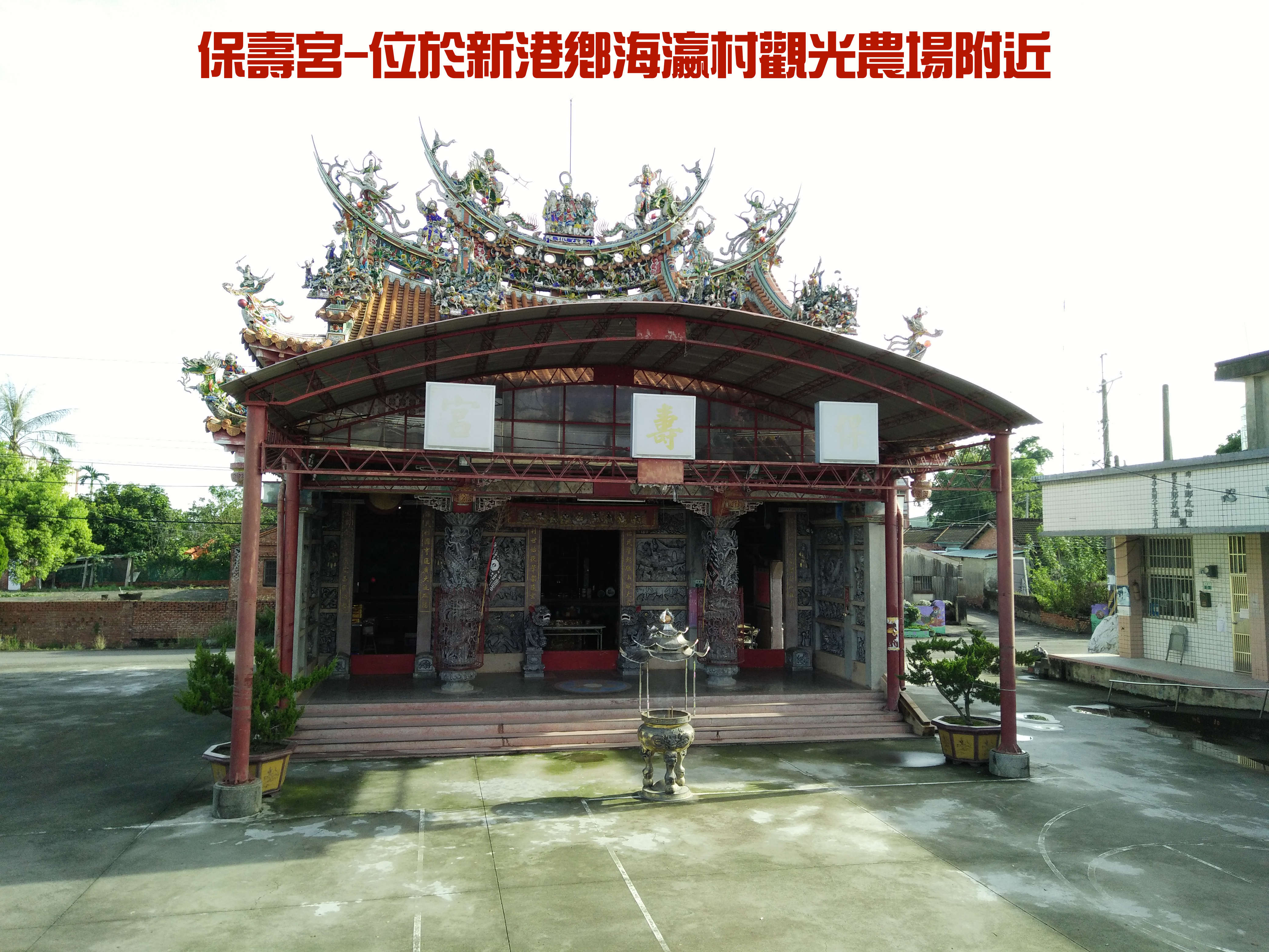 嘉義縣新港鄉海瀛村保壽宮